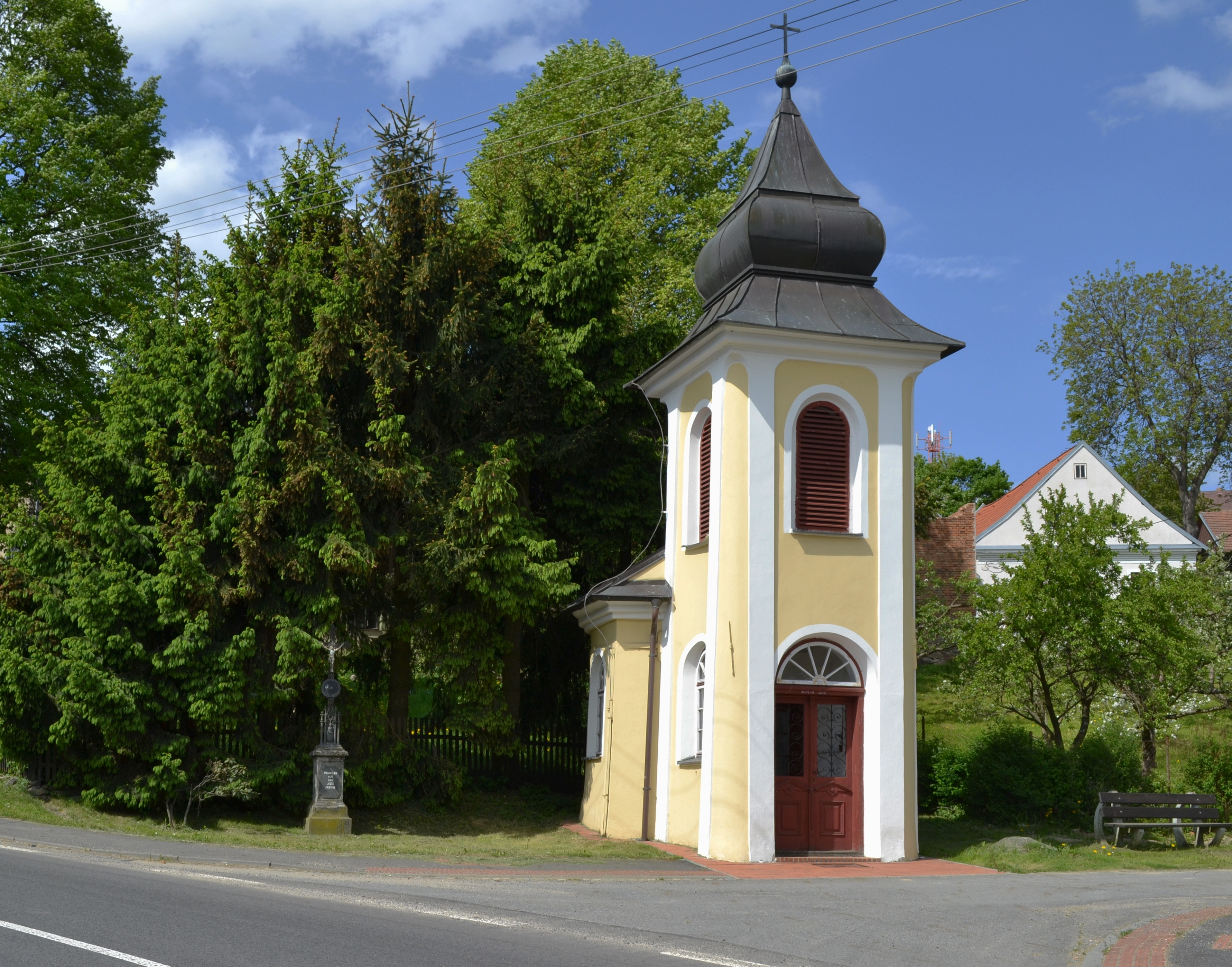 Divišov (Bystřice nad Pernštejnem) - kaple se zvonicí